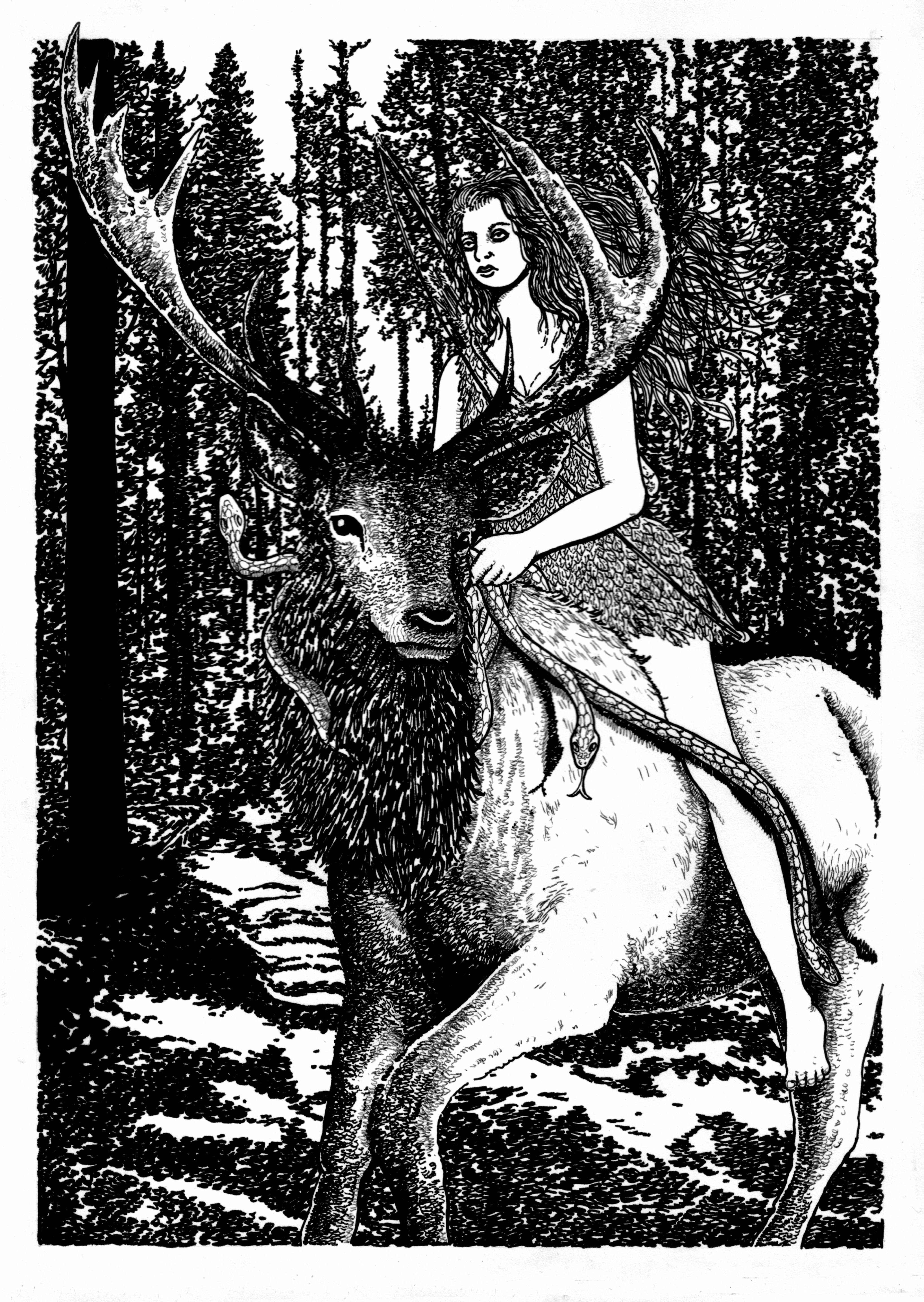 Wiła autorstwa Andy'ego Paciorka.